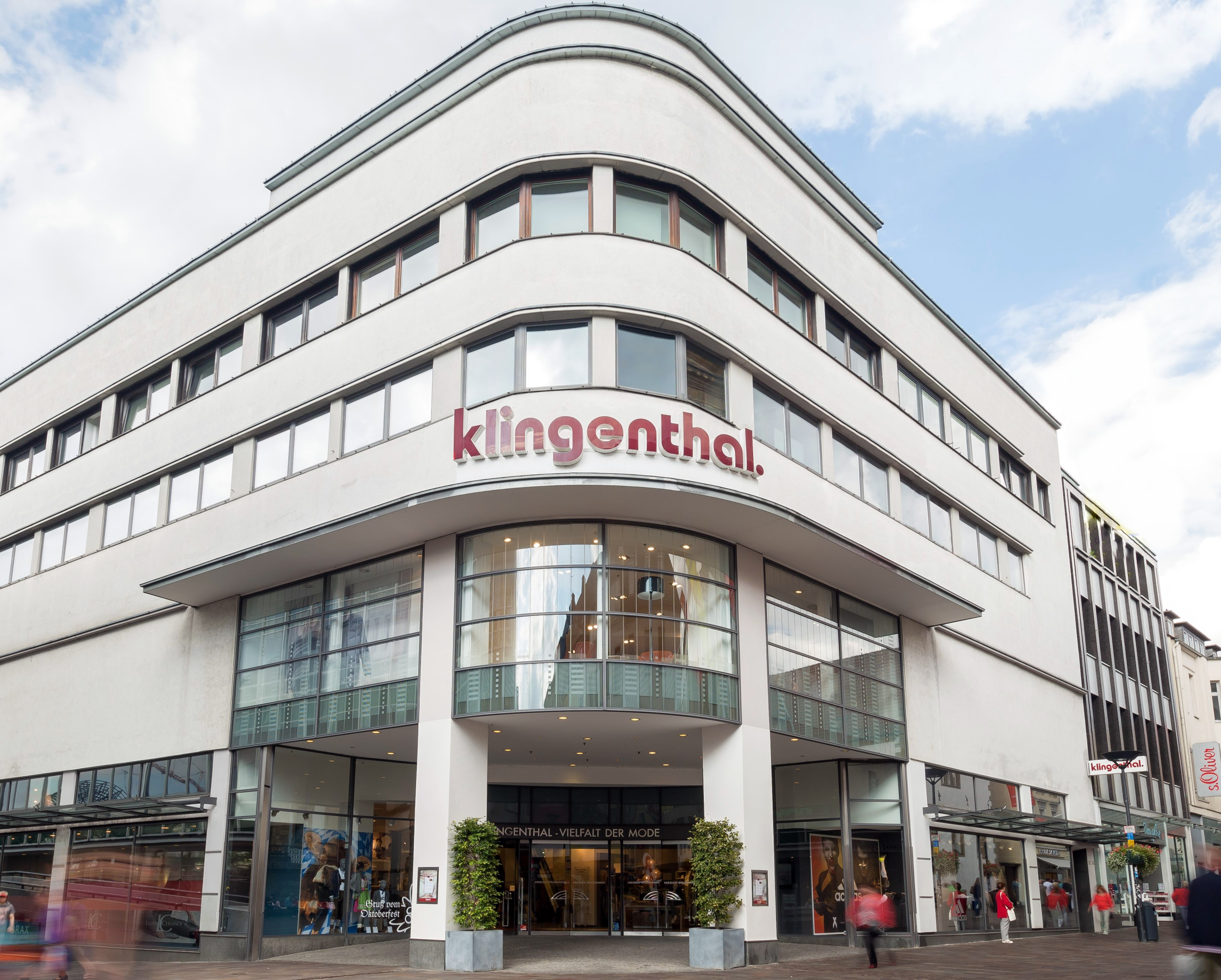 Außenansicht des Modehauses Klingenthal in Paderborn